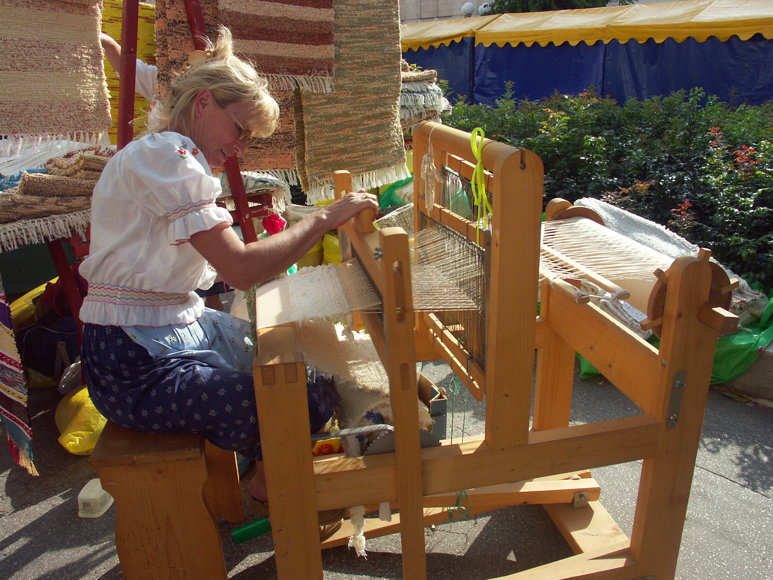 Author: Radovan Bahna, Slovak republic